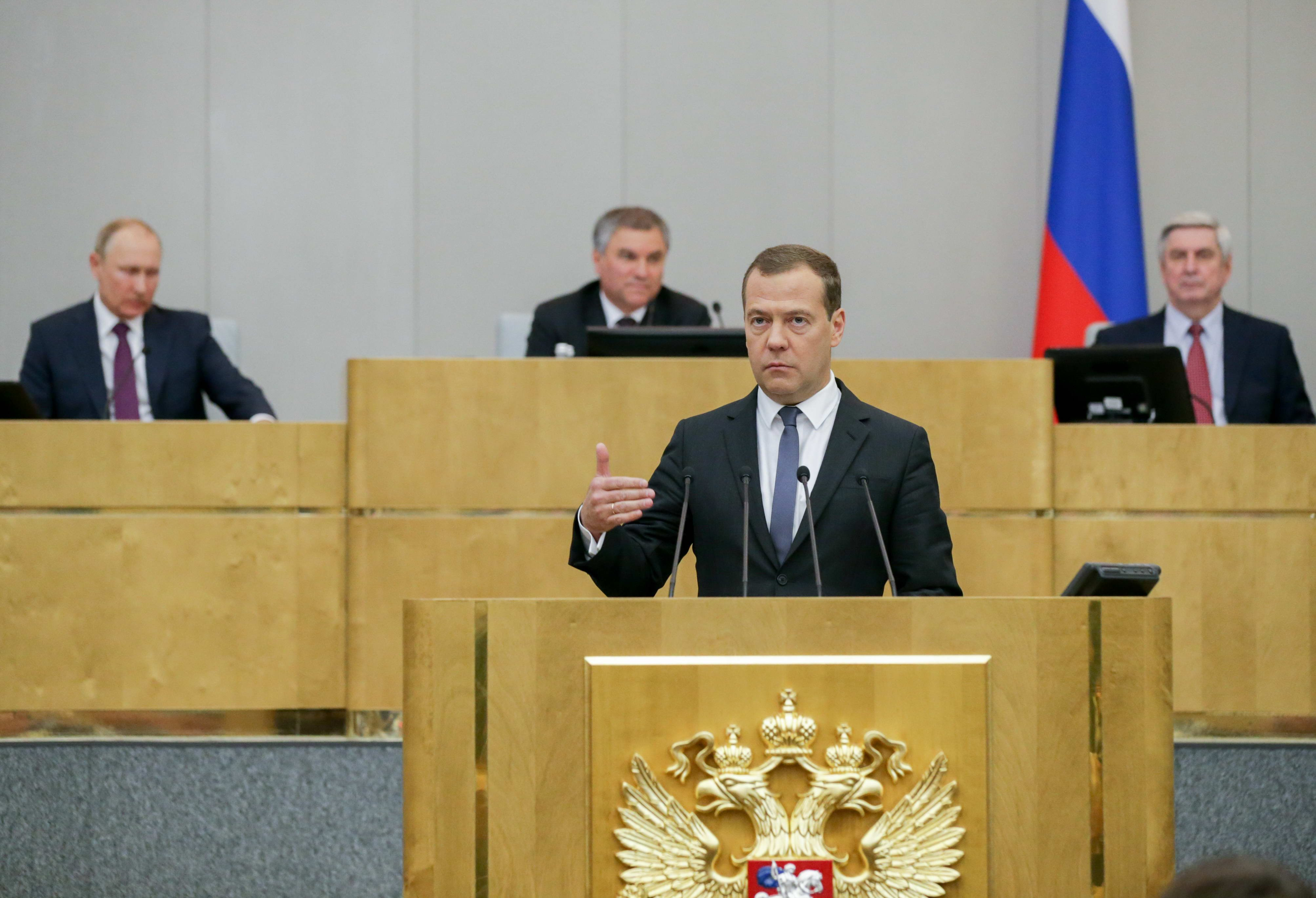 Председатель Правительства России Д.А. Медведев в Государственной думе 8 мая 2018 года